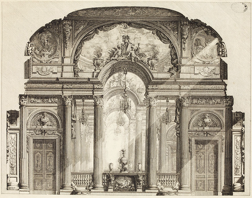 “Salone del Sole”, realizzato da Charles De Wailly nel Palazzo di Cristoforo Spinola in Strada Nuova a Genova. Incisione di Jean Louis Desprez tratta dall'Encyclopédie ou Dictionnaire raisonné des sciences, des arts et des métiers de Denis Diderot et d’Alembert, Paris, 1751–1772, voce "Architecture"